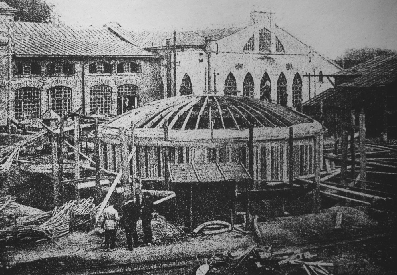 Беларуская (тарашкевіца): Менск (Miensk), вуліца Захараўская (vulica Zacharaŭskaja) каля скрыжаваньня з Садовай (vulica Sadovaja). Першая менская электрастанцыя